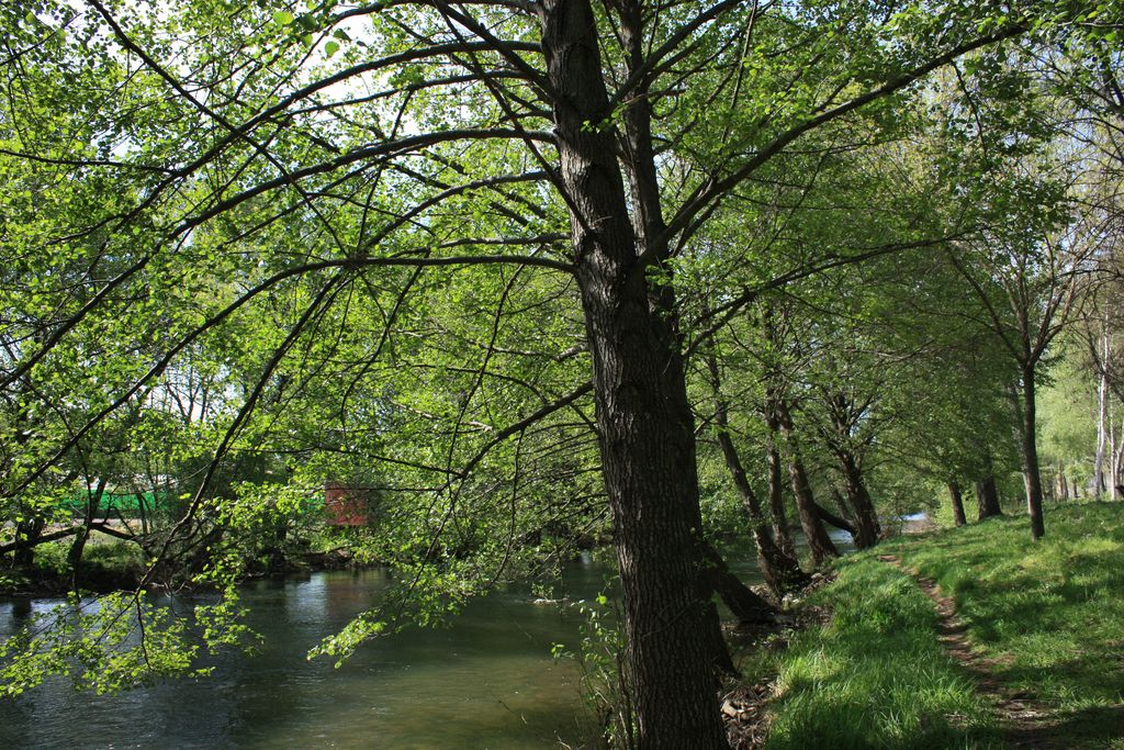 N40�1'47.04" W6�4'50.66" 331,0